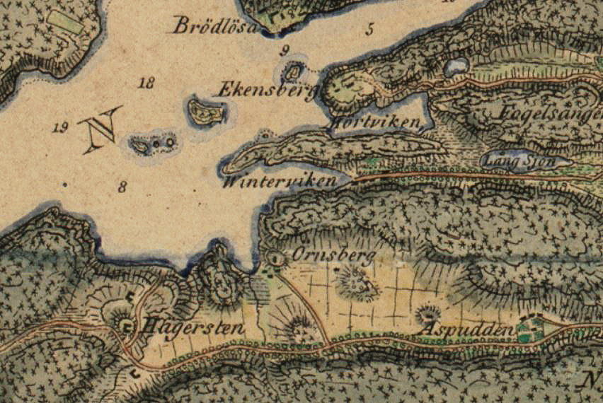 Del av karta över Stockholm med omgivning visande gårdarna Hägersten, Örnsberg och Aspudden